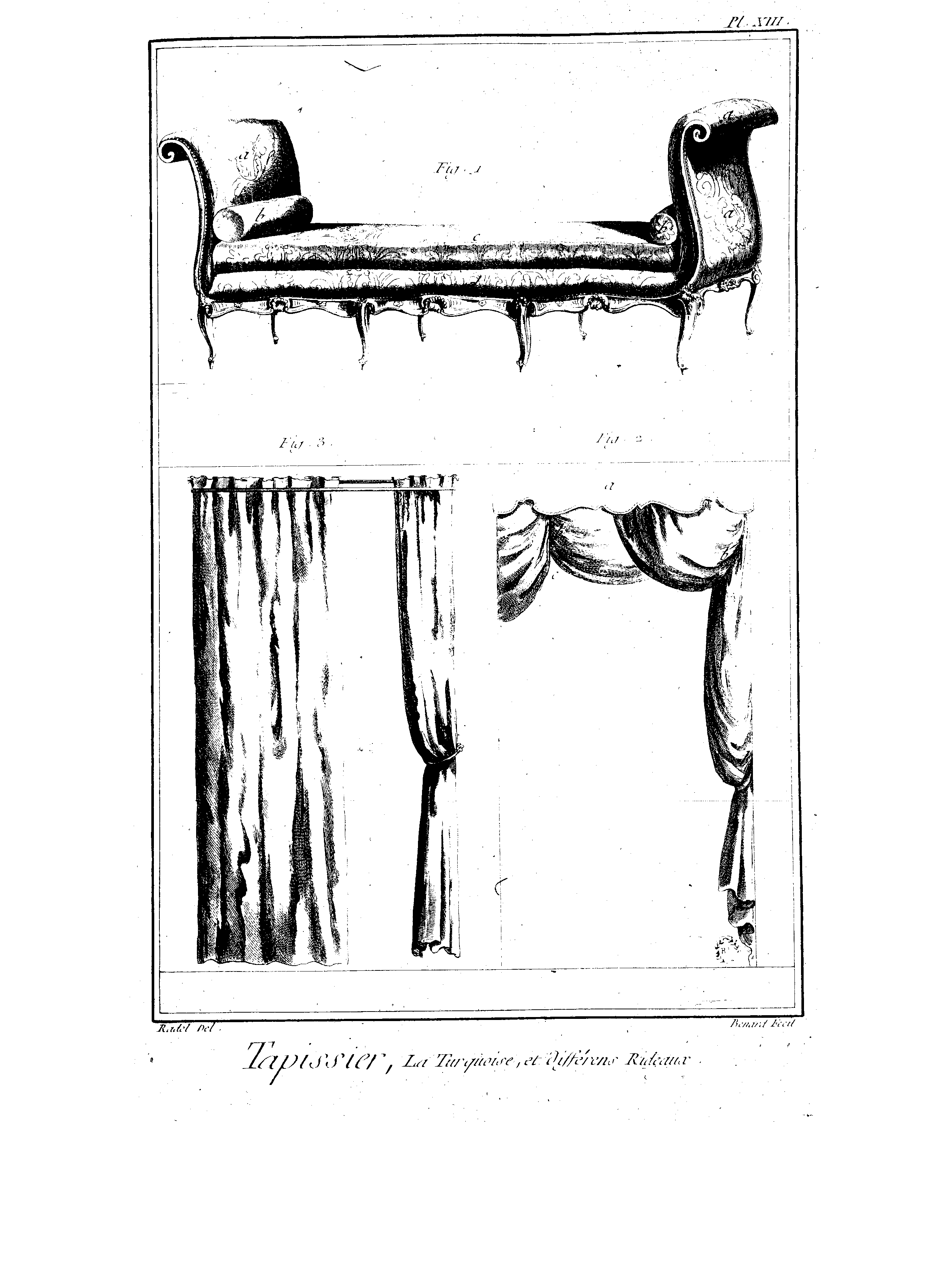 Tapissier, La Turquoise, et différens [sic] Rideaux Planches de l'Encyclopédie de Diderot et d'Alembert, volume 8